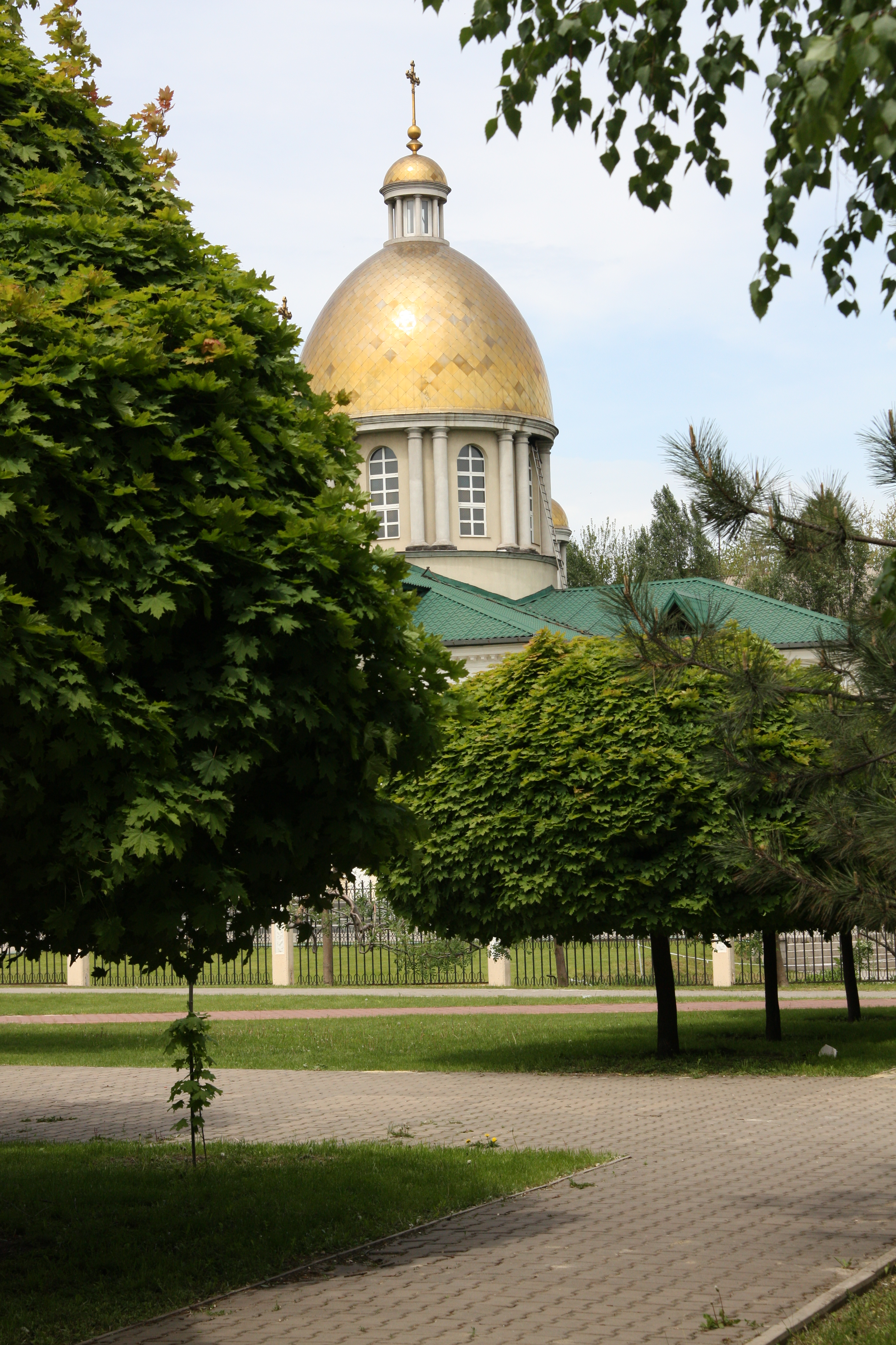 «Парк ім. Шевченка», м. Запоріжжя